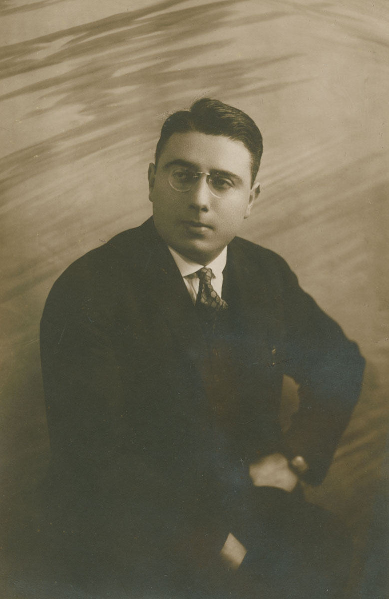 Moisiejus Kopelmanas, verslininkas, apie 1928 m.